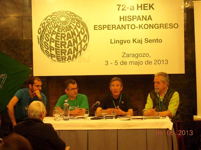 estraranoj de Hispana Esperanto-Federacio (HEF) dum ties ĝenerala asembleo en la 72-a Hispana Kongreso de Esperanto